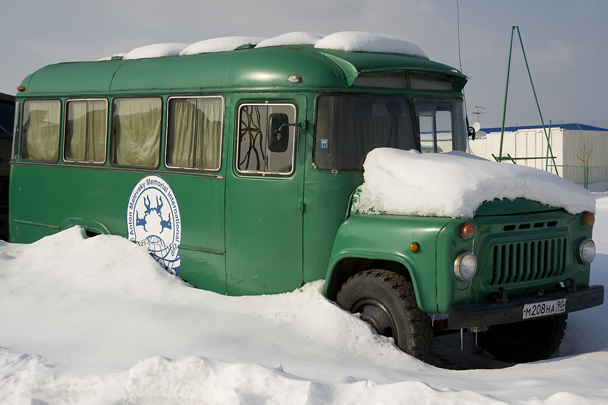 Bus KAVZ-685